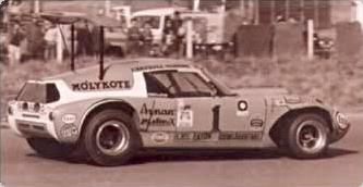 Fotografía en tono Sepia del Prototipo conocido como Chevrolet Nova Naranja de Turismo Carretera.